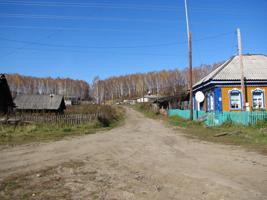 Улицы Соколовки